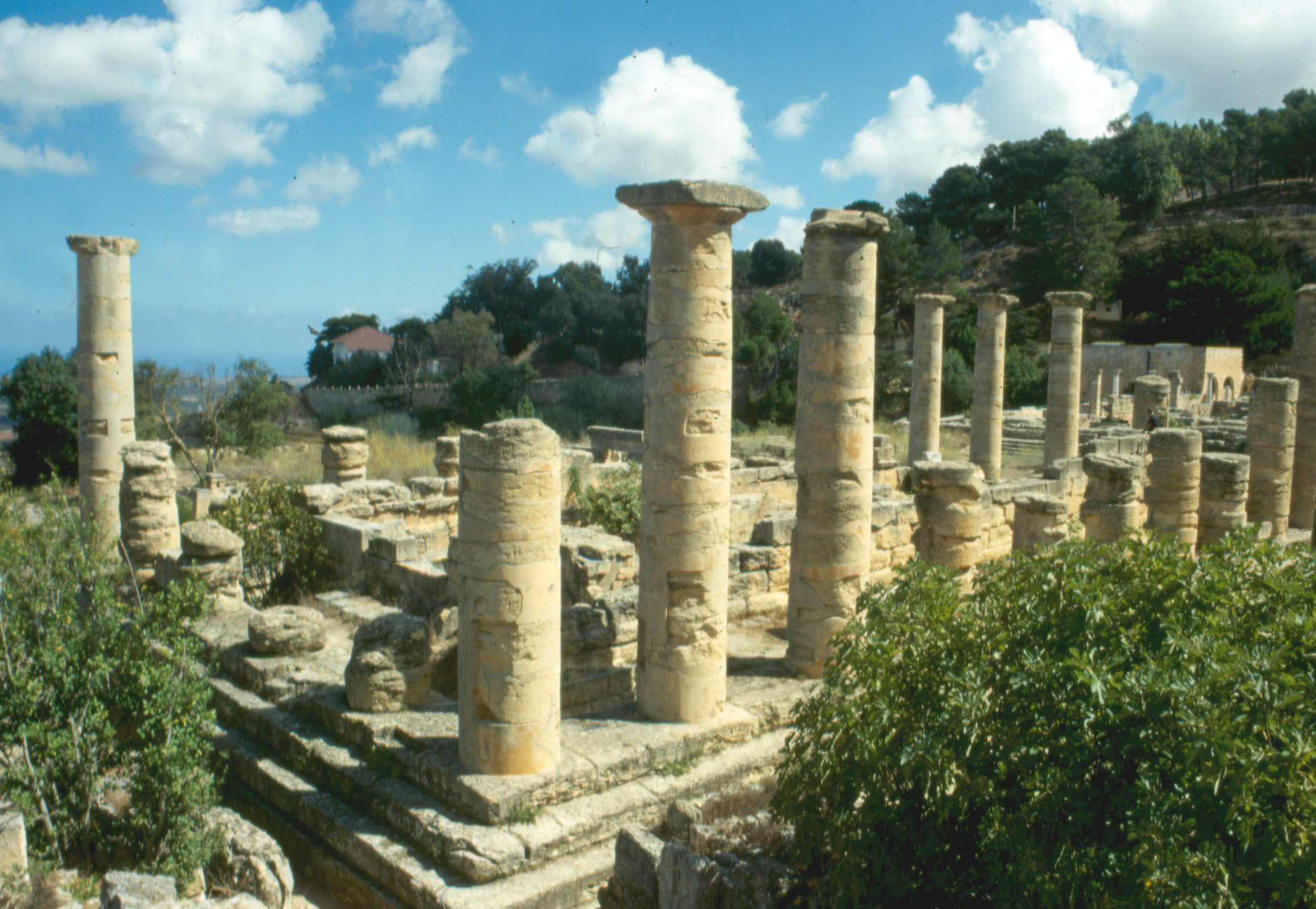 Libia, Cirene (sito archeologico), Tempio di Apollo